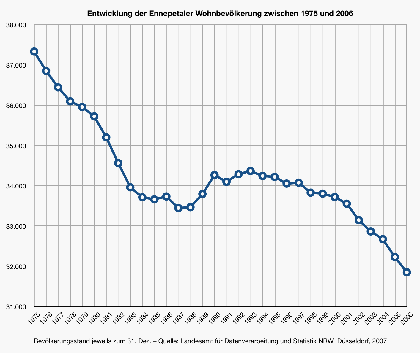 Entwicklung der Bevölkerungsgröße in Ennepetal zwischen 1975 und 2006